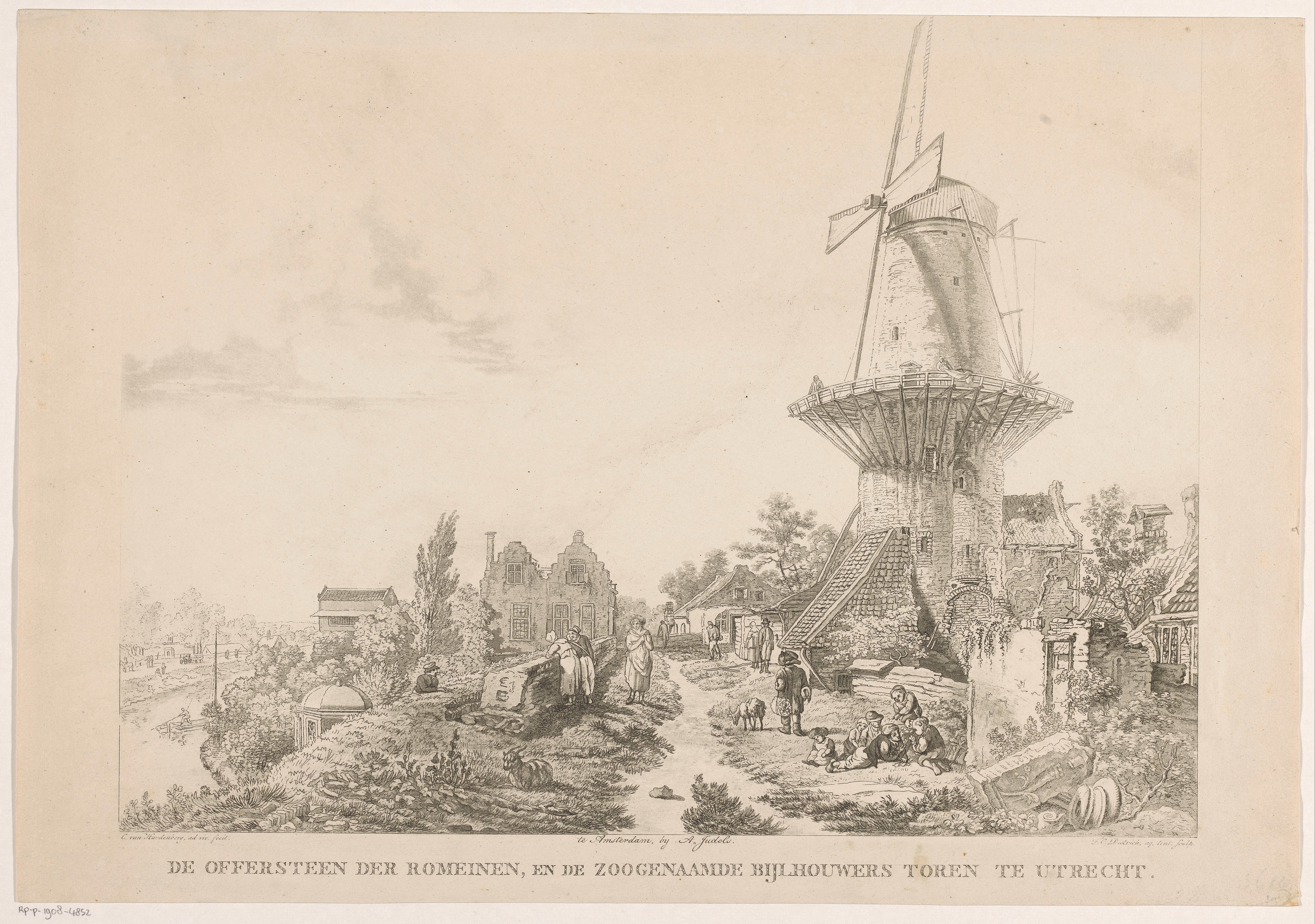 IdentificatieTitel(s): Offersteen der Romeinen en de Bijlhouwerstoren in UtrechtObjecttype: prent Objectnummer: RP-P-1908-4852Opschriften / Merken: verzamelaarsmerk, verso, gestempeld: Lugt 2228VervaardigingVervaardiger: prentmaker: Friedrich Christoph Dietrich (vermeld op object)naar ontwerp van: Cornelis van Hardenbergh (vermeld op object)uitgever: A. Judels (vermeld op object)opgedragen door: Johannes Weppelmanopgedragen aan: Willem I (koning der Nederlanden)Plaats vervaardiging: prentmaker: Duitslandnaar ontwerp van: Nederlanduitgever: Amsterdamopgedragen door: Nederlandopgedragen aan: NederlandDatering: 1789 - 1843Materiaal: papier Techniek: aquatint / etsenAfmetingen: blad: h 352 mm (binnen plaatrand afgesneden) × b 505 mm (binnen plaatrand afgesneden)ToelichtingLos tekstblad met beschrijving aanwezig bij RMA.OnderwerpWat: stadsgezichten en landschappen met bouwsels van mensenwindmill in landscapegoatpublic road in villageWaar: BijlhouwerstorenVerwerving en rechtenVerwerving: aankoop 1908Copyright: Publiek domein